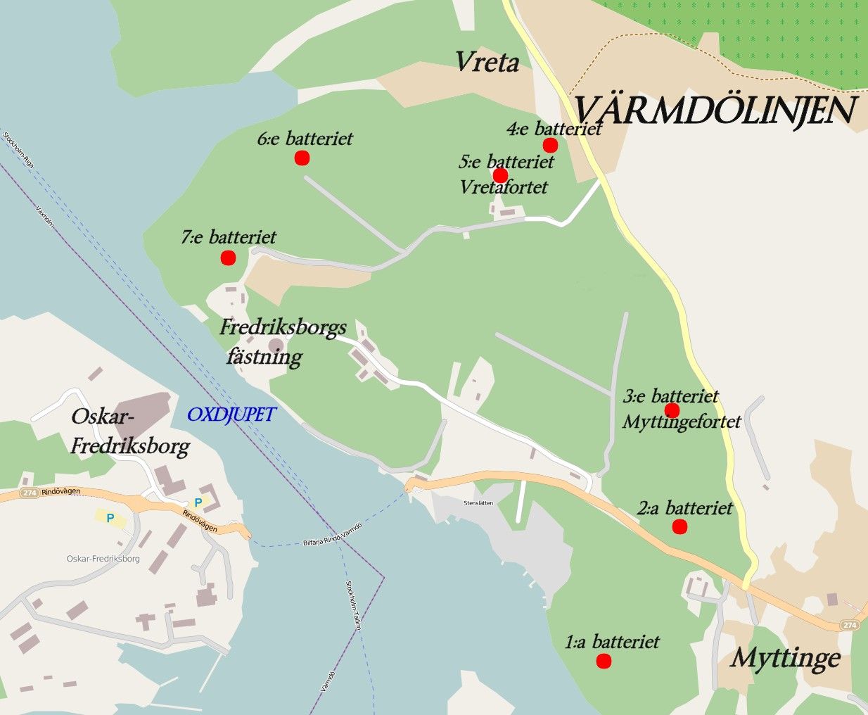 Värmdölinjen, karta visande batteri 1-7 This map may be incomplete, and may contain errors. Don't rely solely on it for navigation.